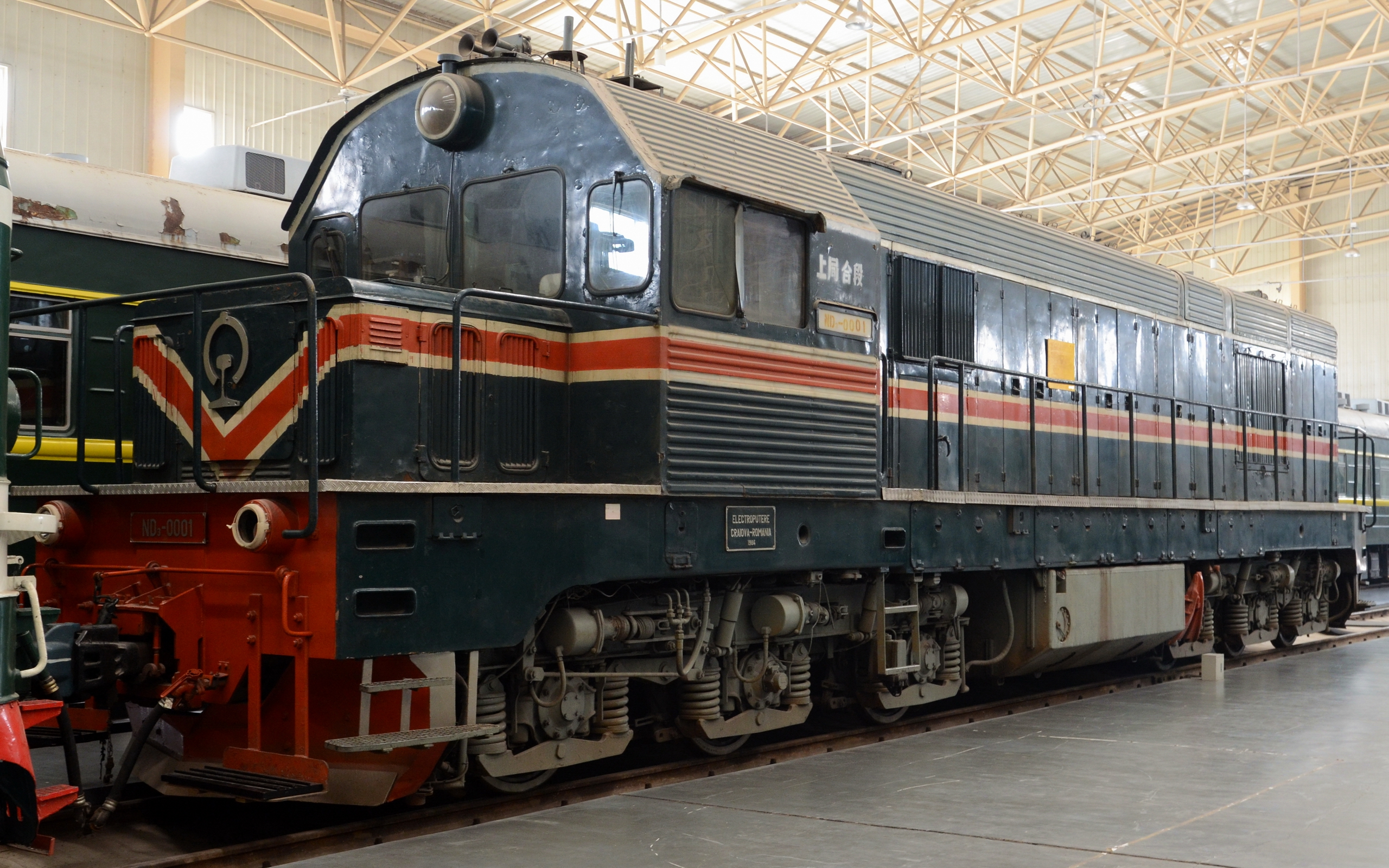 ND3型0001号机车保存在中国铁道博物馆